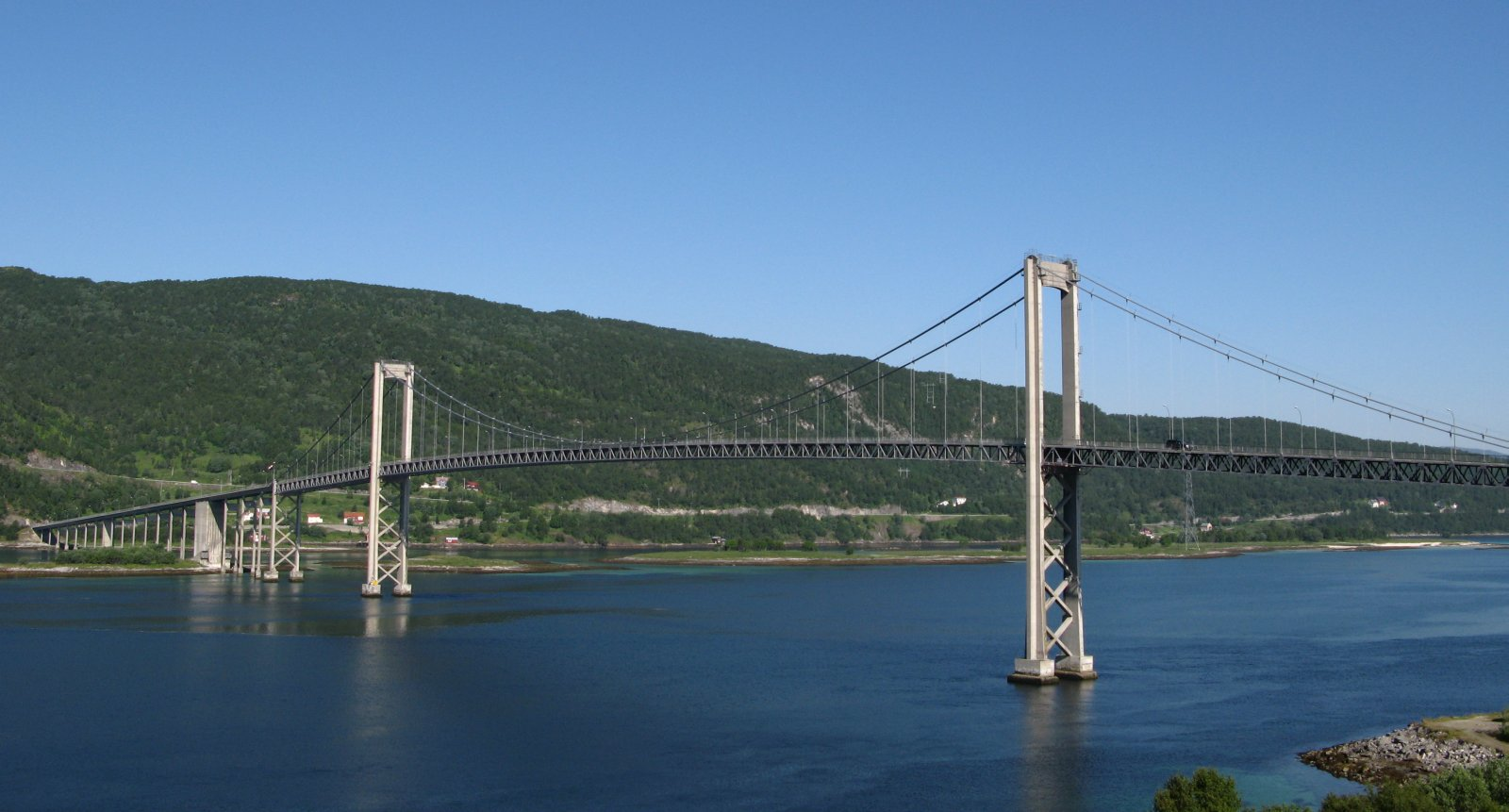 Tjeldsundbrua in Norway